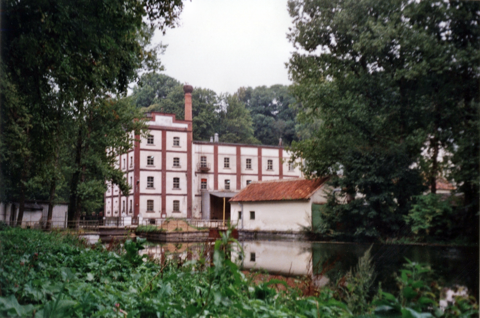 Die Koy-Mühle mit Stausee in Miłakowo. Scan eines Papierfotos.